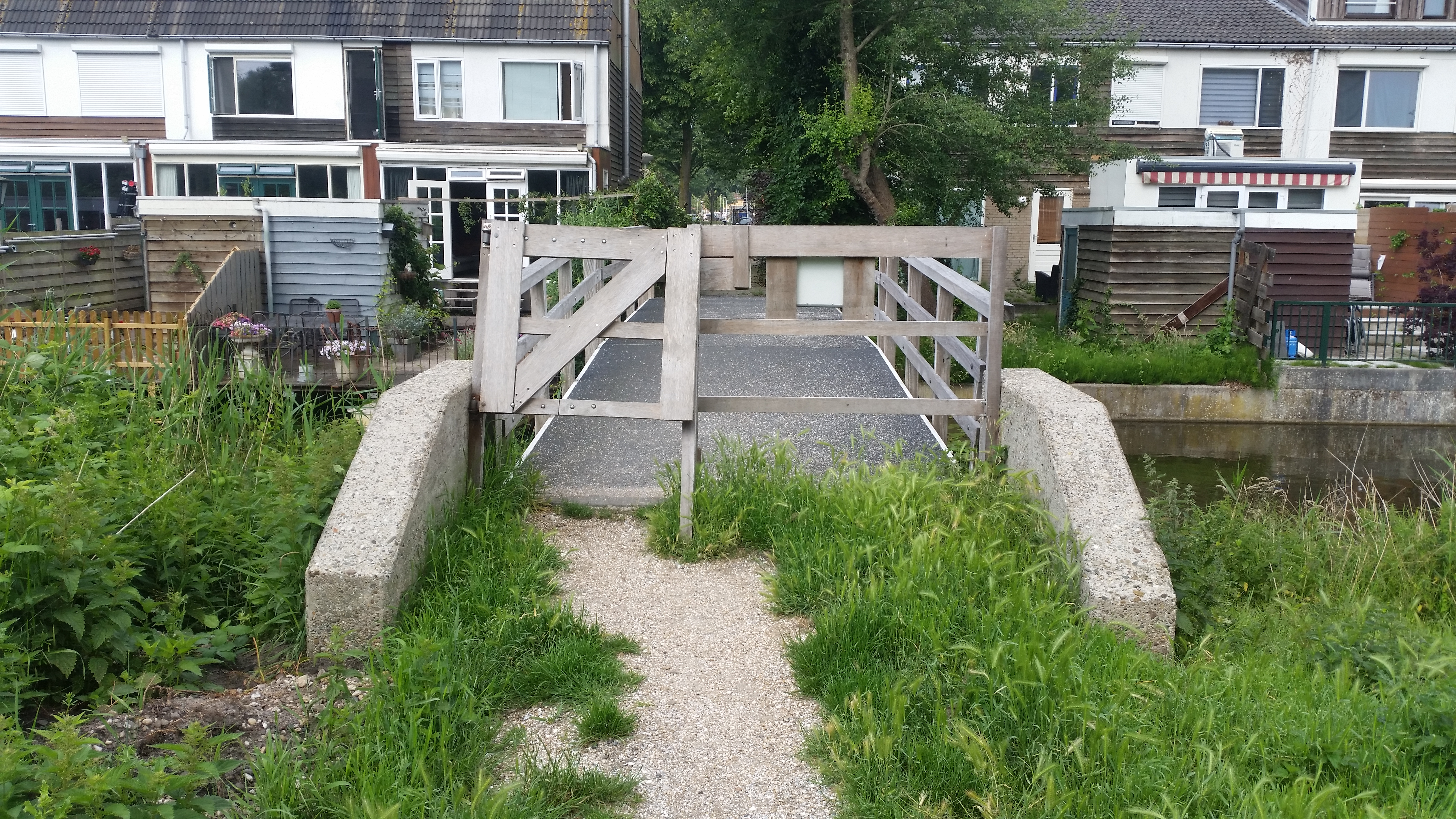 Impressie van Brug 1482, Jos Gemmekebrug vlak nadat zij haar naam heeft gekregen